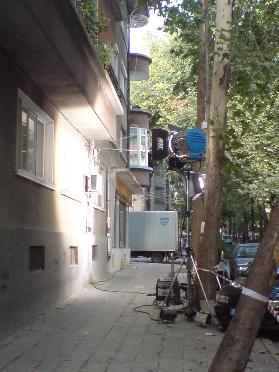 Burgas, Bulgarien: Sv. Sv. Kiril i Metodi-Straße während der Dreharbeiten zum Film The Island von Kamen Kalew